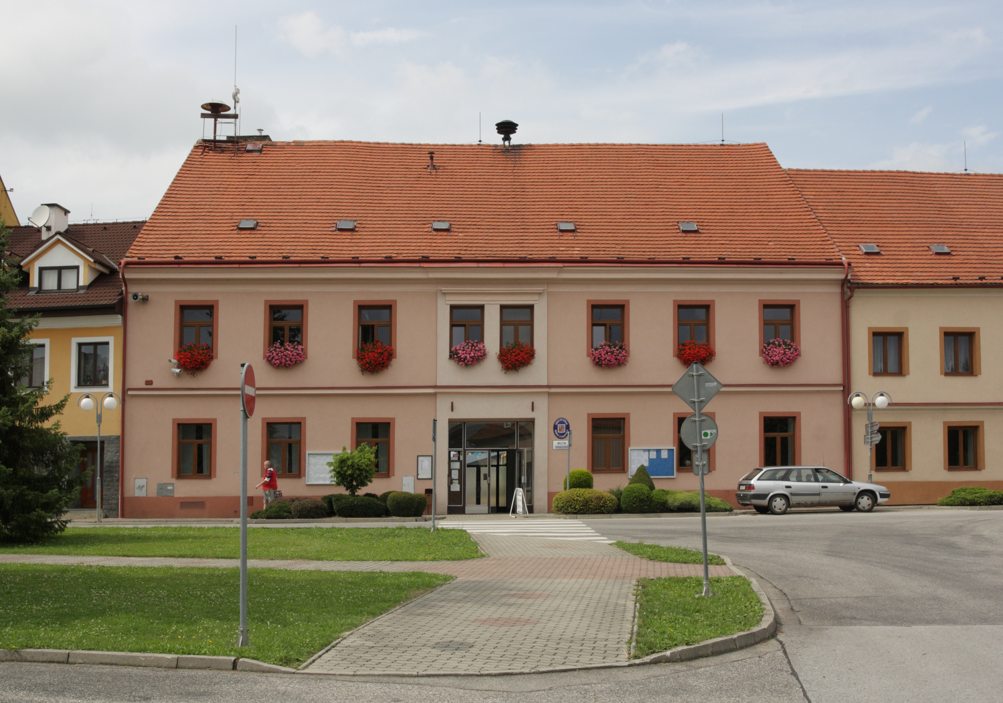 Horní Stropnice - obecní úřad.